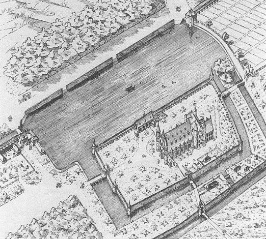 Binnenhof bovenaanzicht tekening